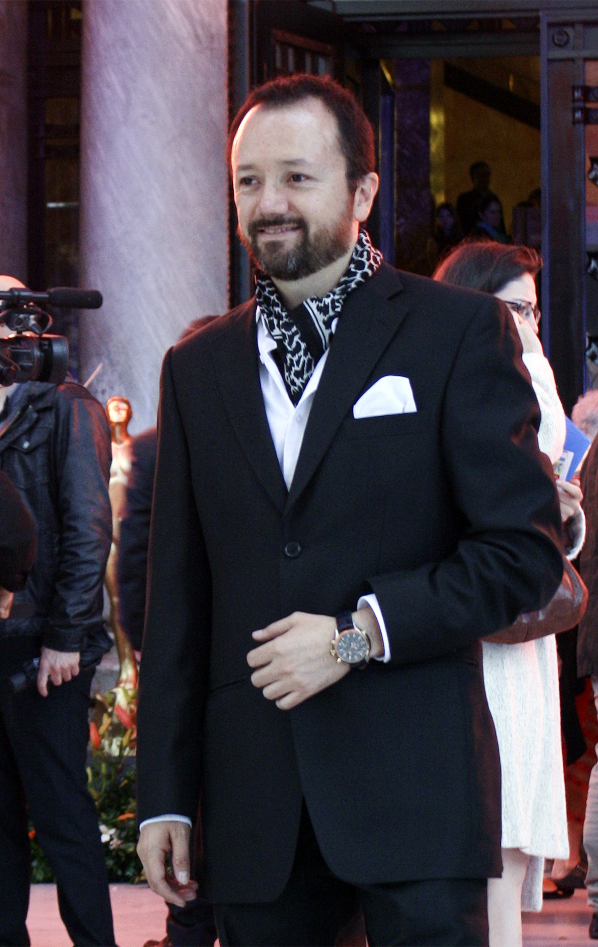 Orlando Moguel at the Arieles Awards 2015